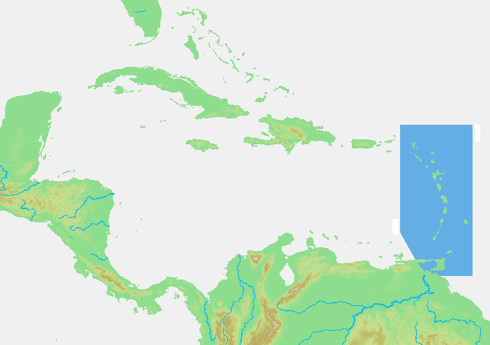 Caribbean - Bovenwindse eilanden.PNG